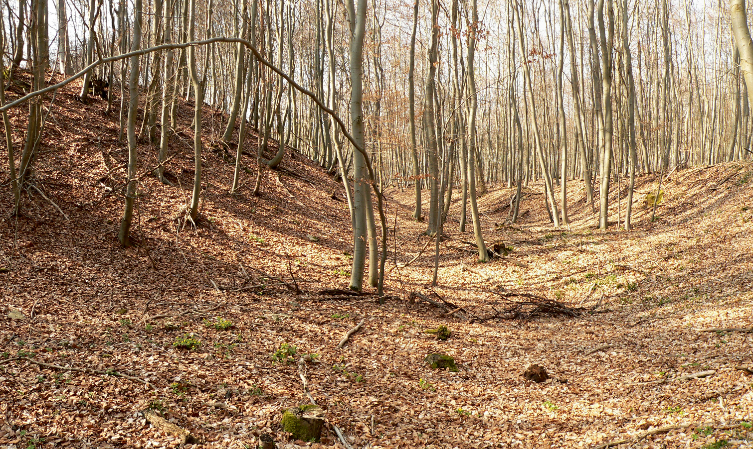 Reitlingsbefestigungen mit Wall der Krimmelburg links, vom Graben aus gesehen